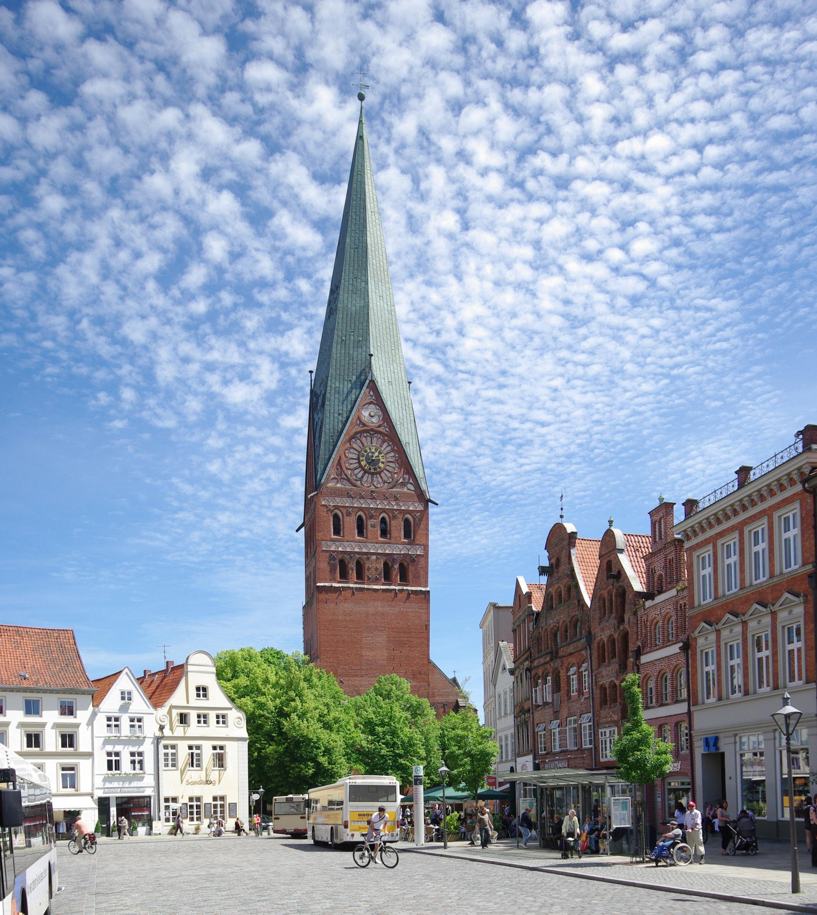 St. Johanniskirche, Lüneburg